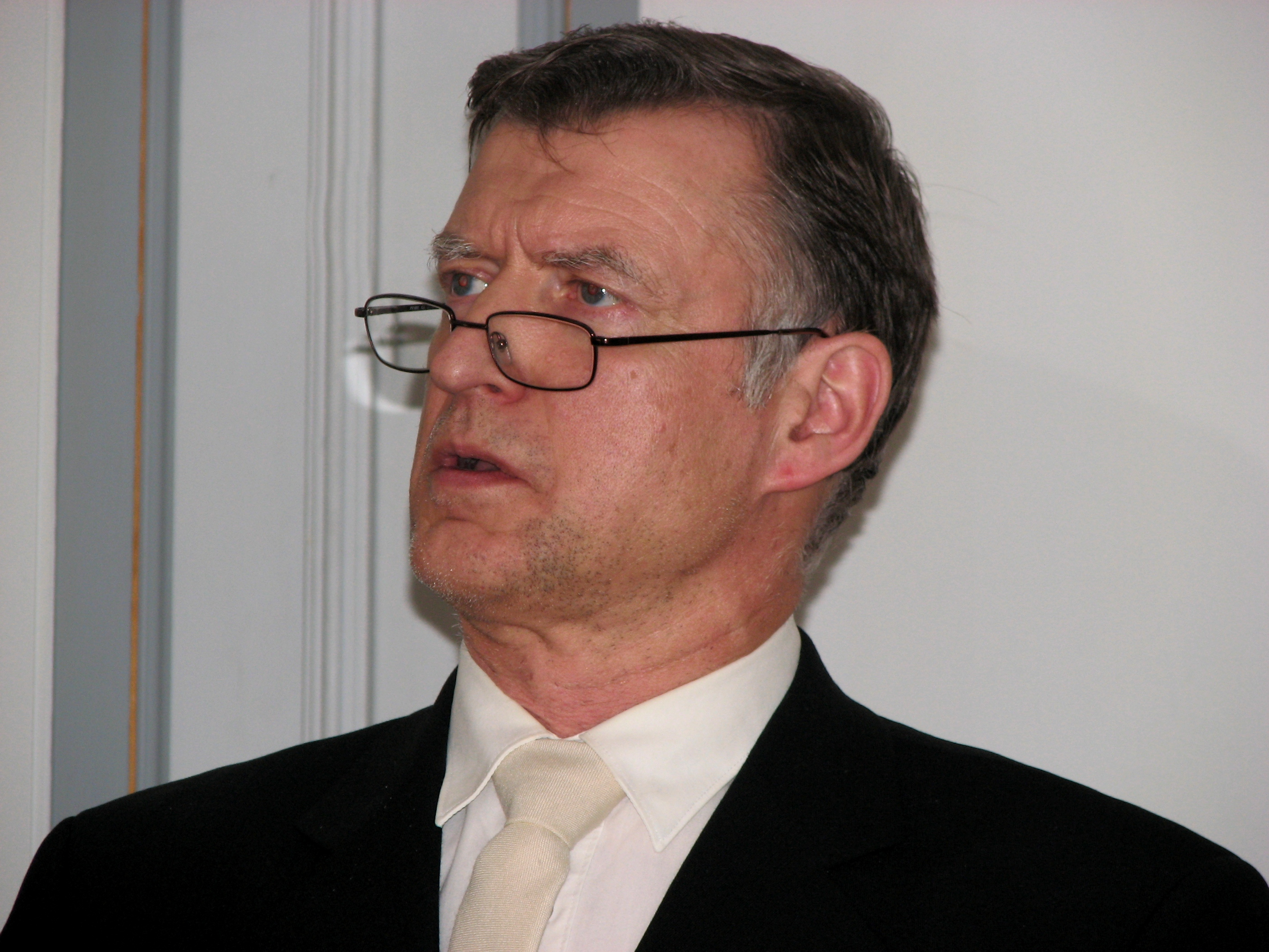 Randar Tasmuth kuulamas venia legendi loengut.